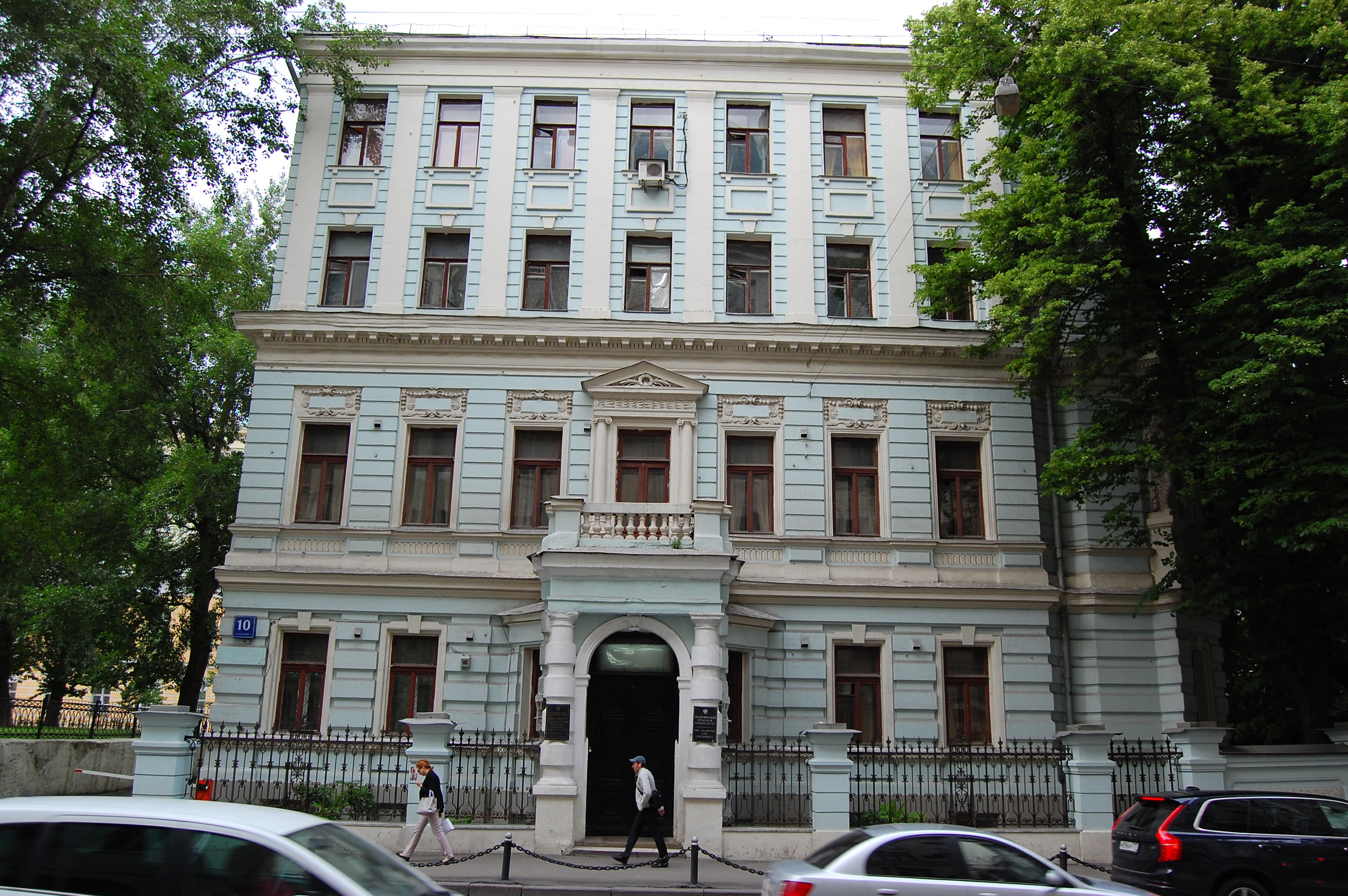 Городская усадьба В. Я. Лепёшкиной, выходящий на улицу фасад